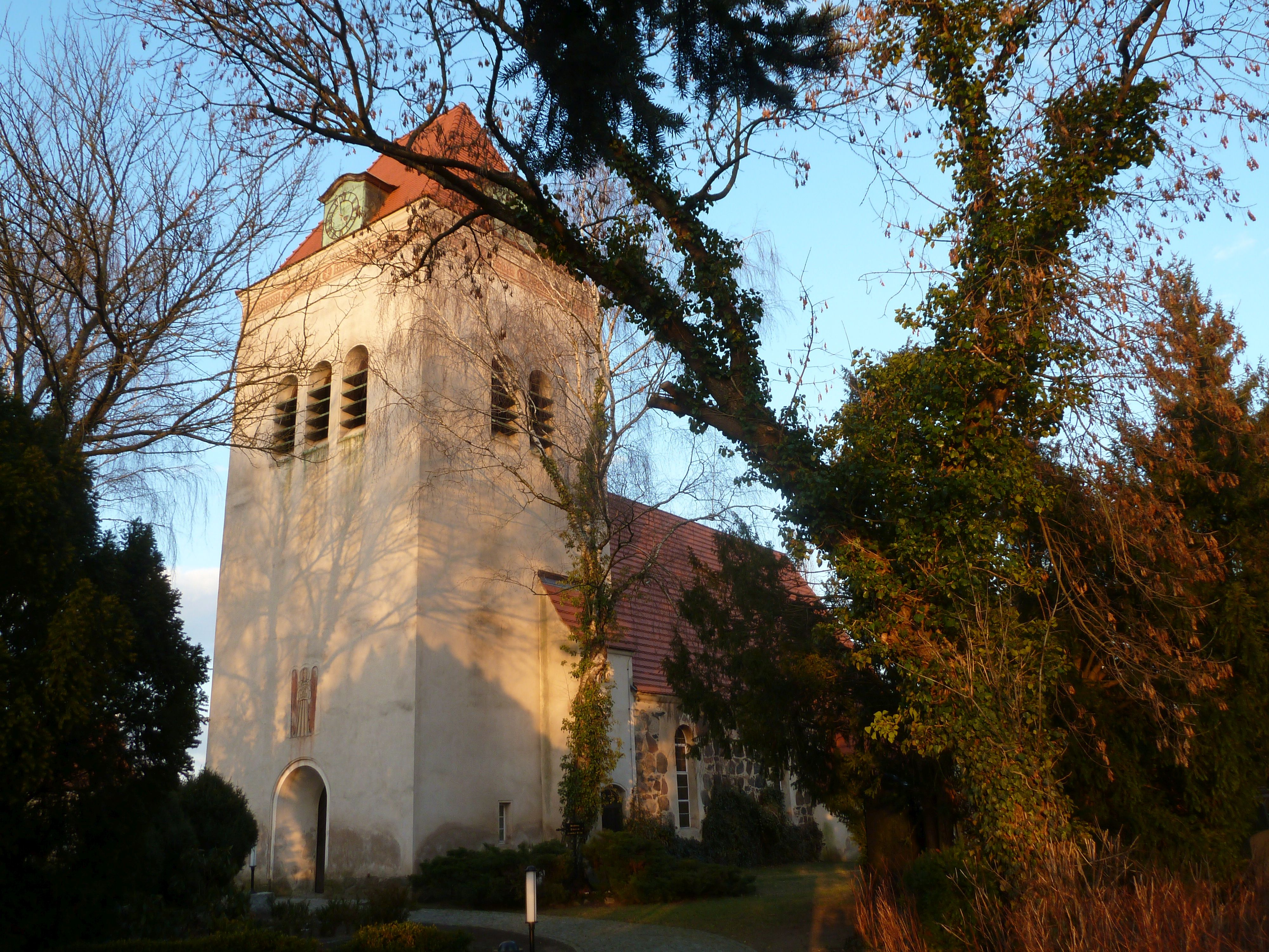 Kirche Dallgow, Baudenkmal, Blick von Südwesten